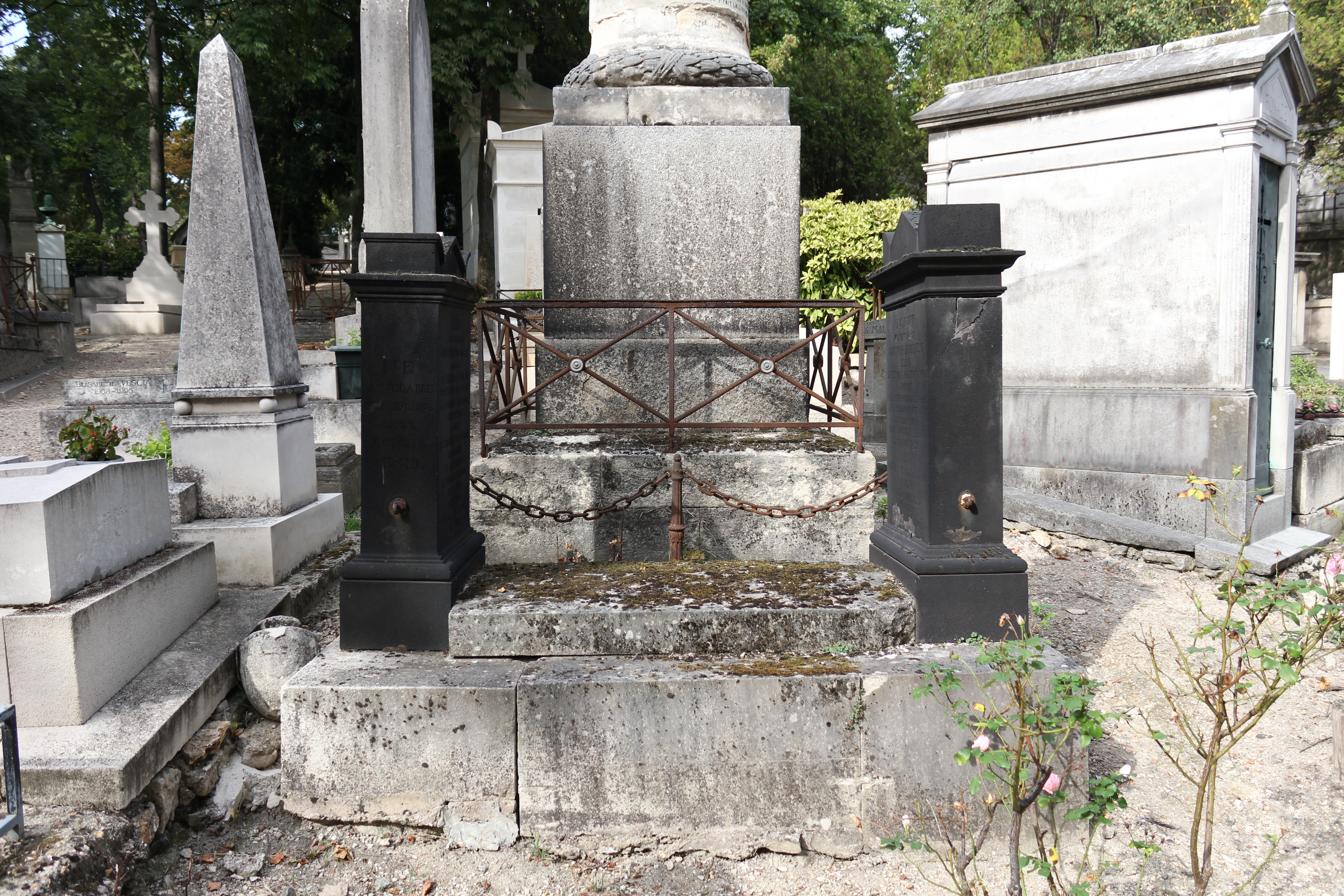 Sépulture de Jean-François Gaultier de Biauzat (1739-1815), avocat, journaliste, maire de Clermont-Ferrand.